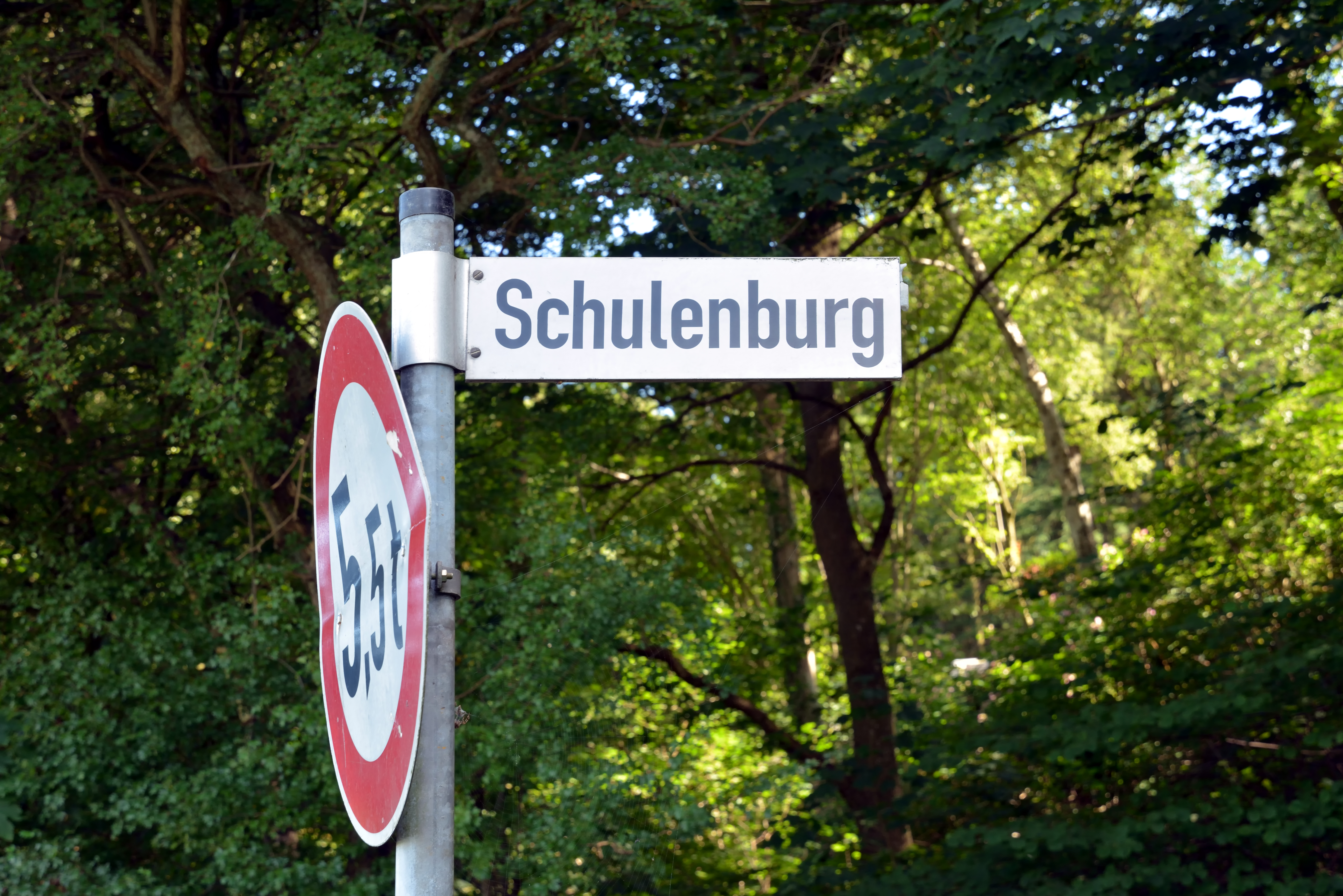 Ein Straßenschild als letzte Erinnerung an die Schulenburg in Itzehoe.